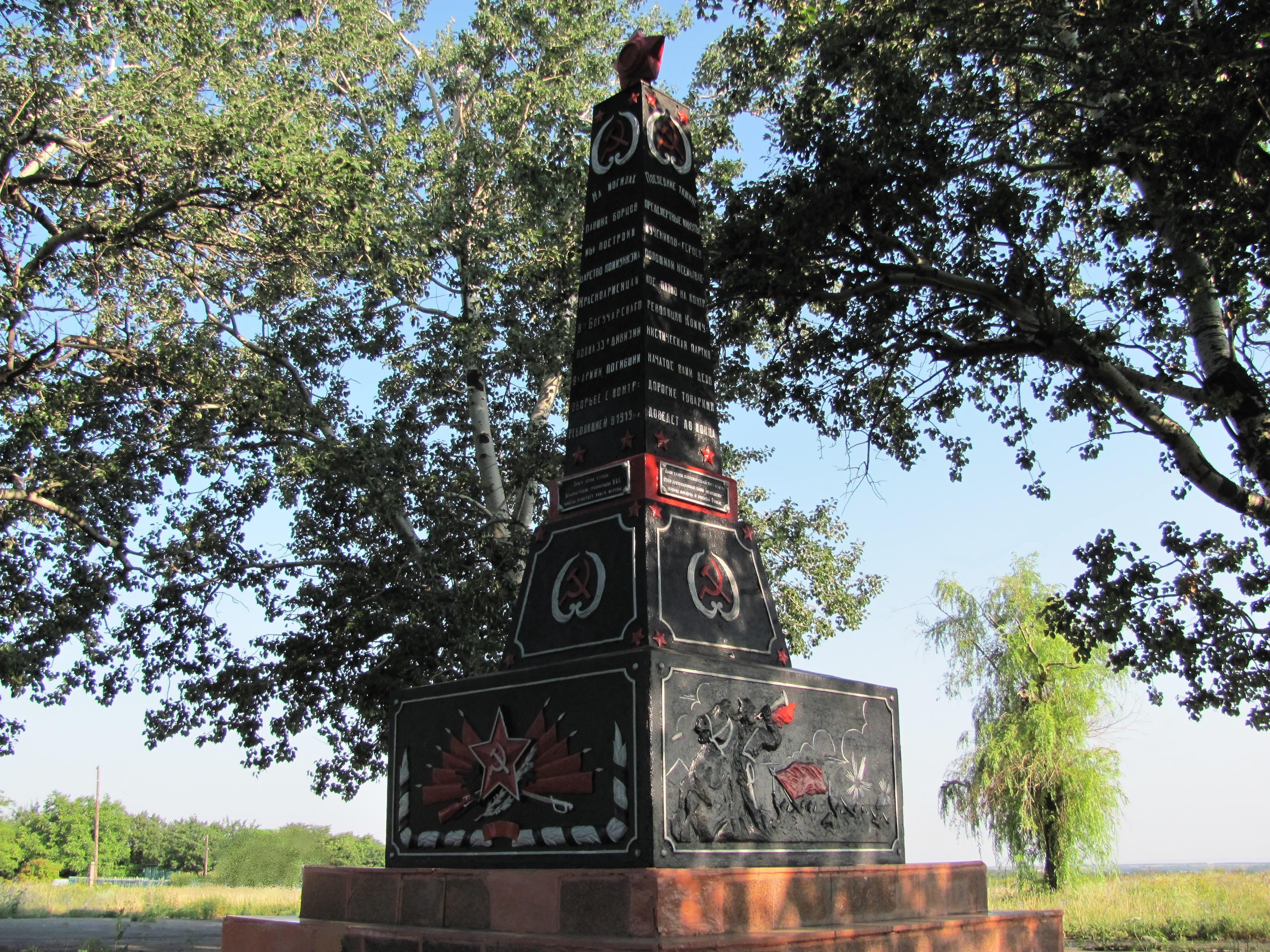 Червонопартизанск